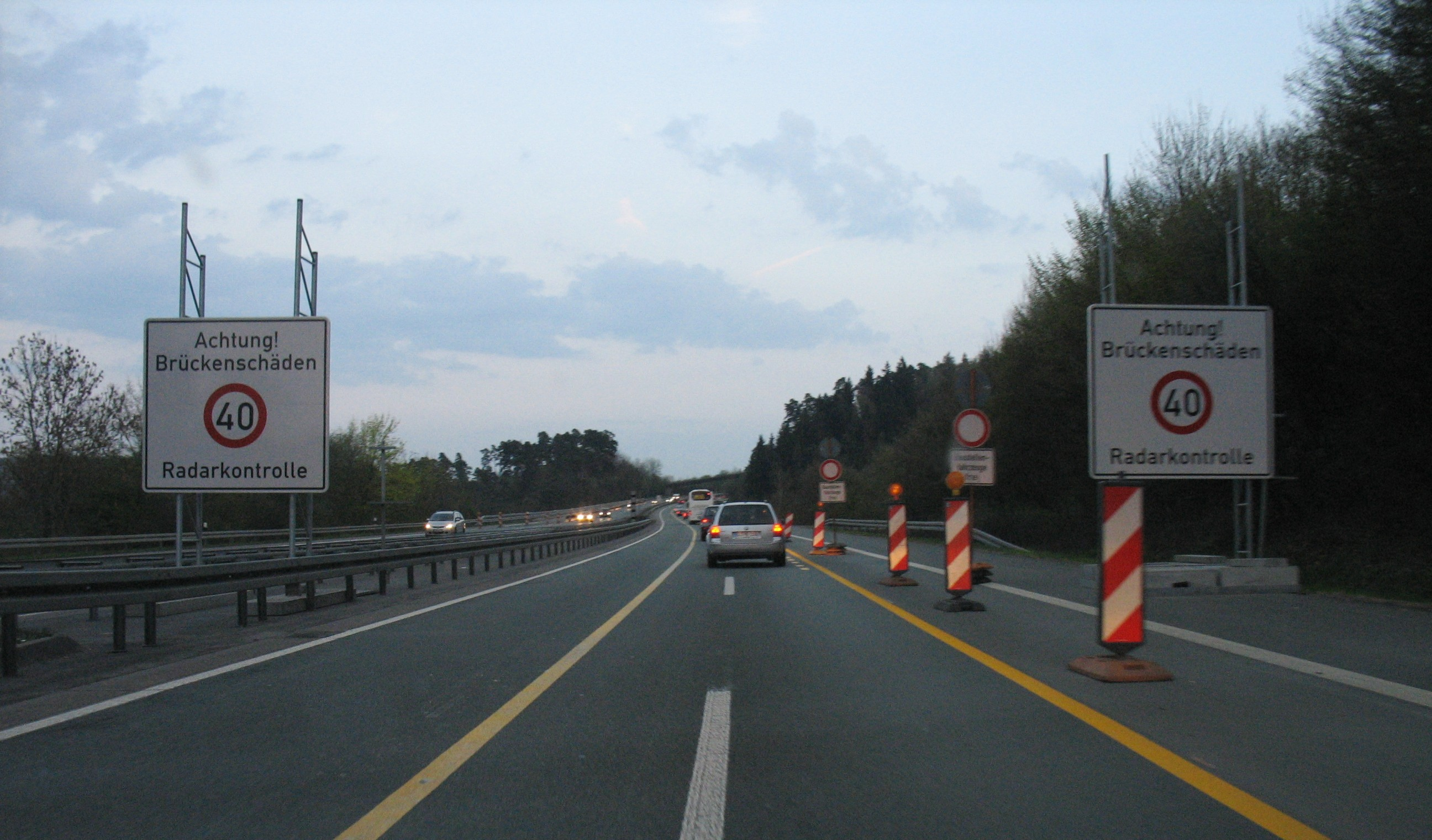 Geschwindigkeitsbeschränkung auf 40km/h auf der Talbrücke Windelbach im Verlauf der A45 in Fahrtrichtung Süd aufgrund von Brückenschäden, welche Anfang 2009 aufgetreten sind.